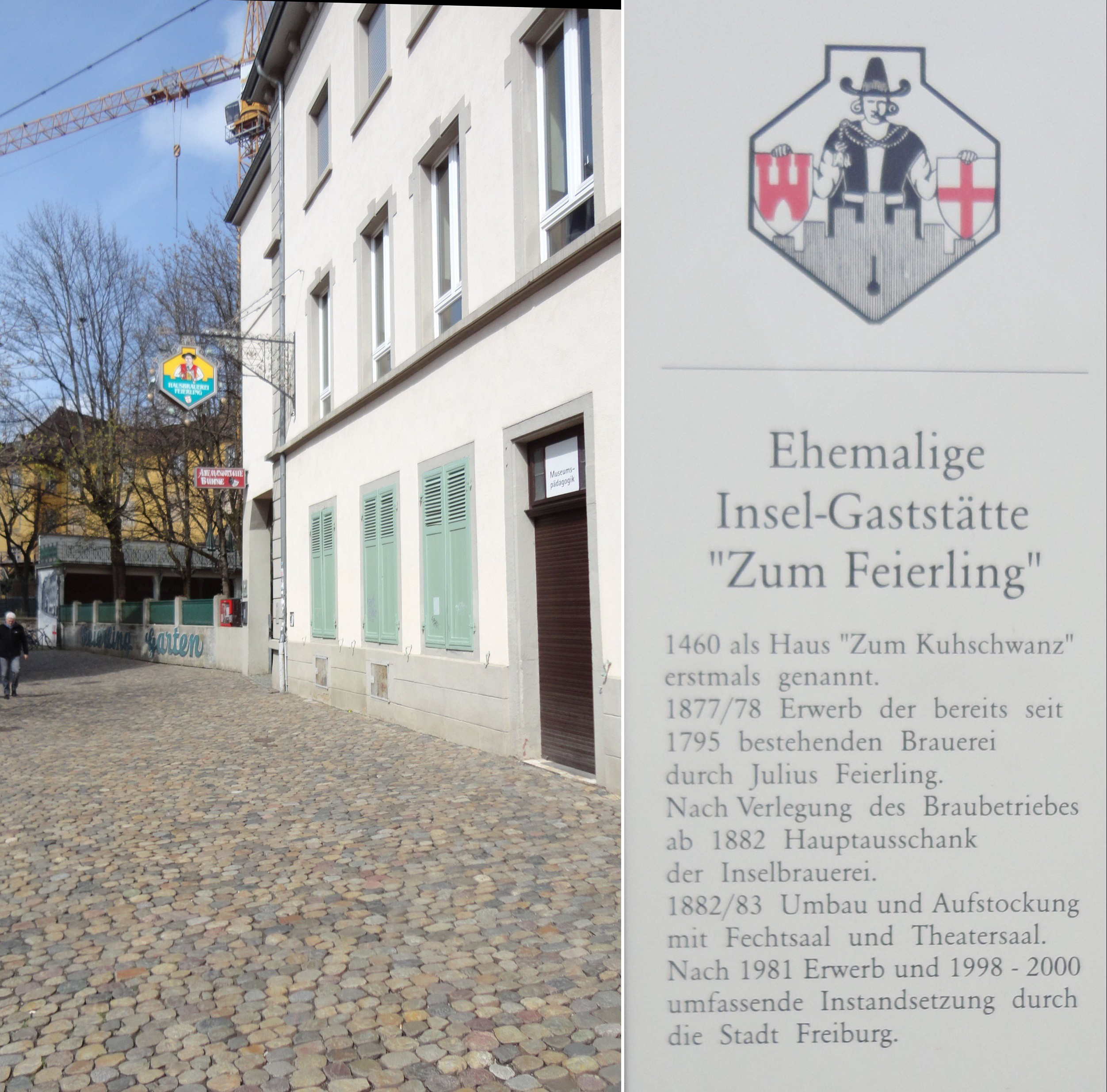 Ehemalige Inselgaststätte in Freiburg im Breisgau. Ab 1950 fanden dort die Vereinsabende des Freiburger Schachvereins statt, sowie Schach-Großveranstaltungen. Dieses Lokal fand Friedrich A. Stock, Vorsitzender des Schachvereins. Heute befindet sich hier die Alemannische Bühne.